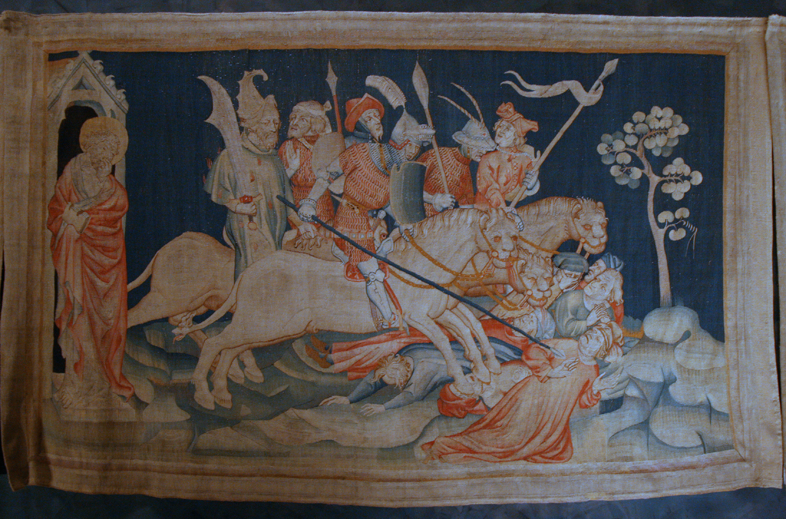 L'Apocalypse au château d'Angers